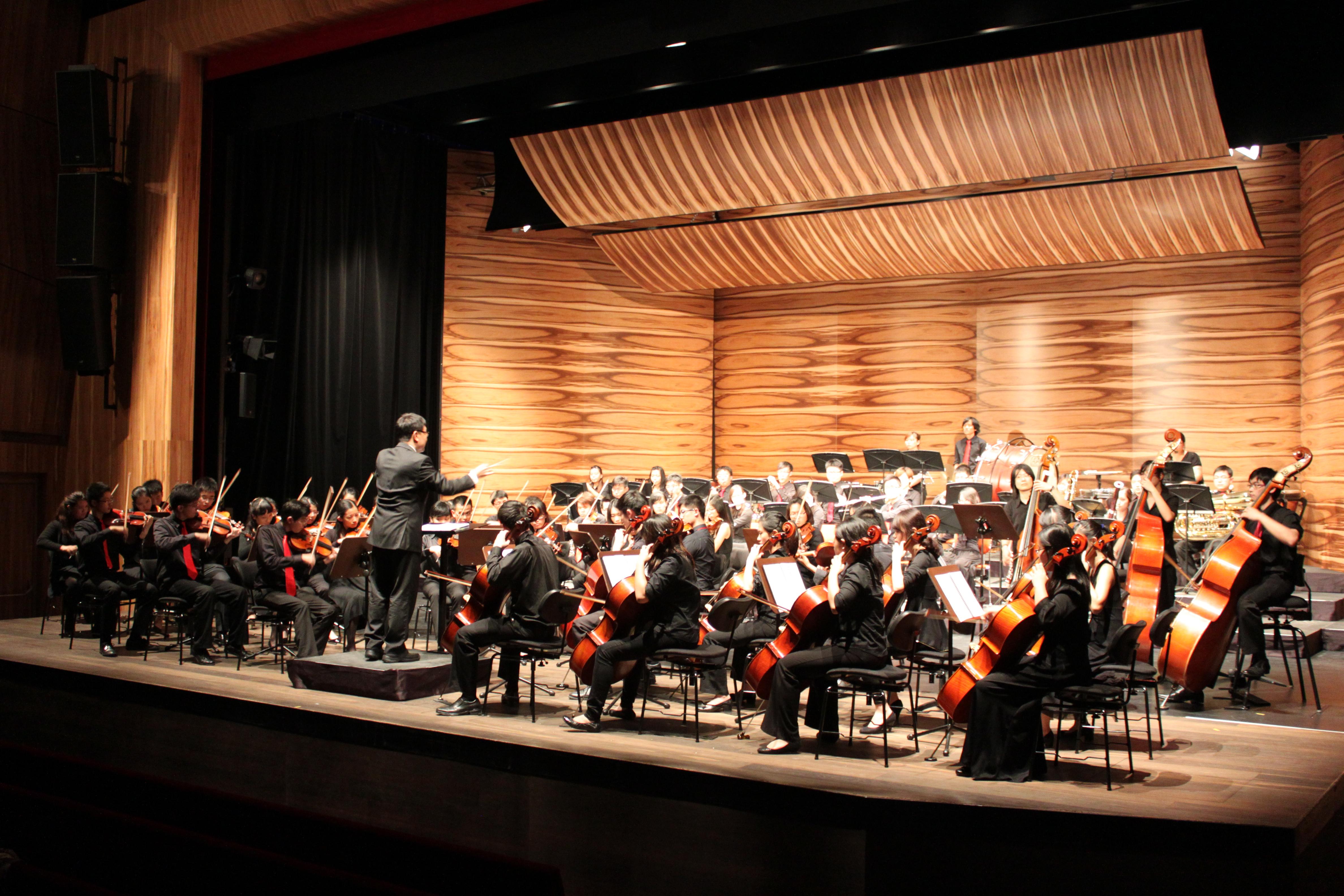 National University of Singapore Symphony Orchestra in Vienna in MuTh